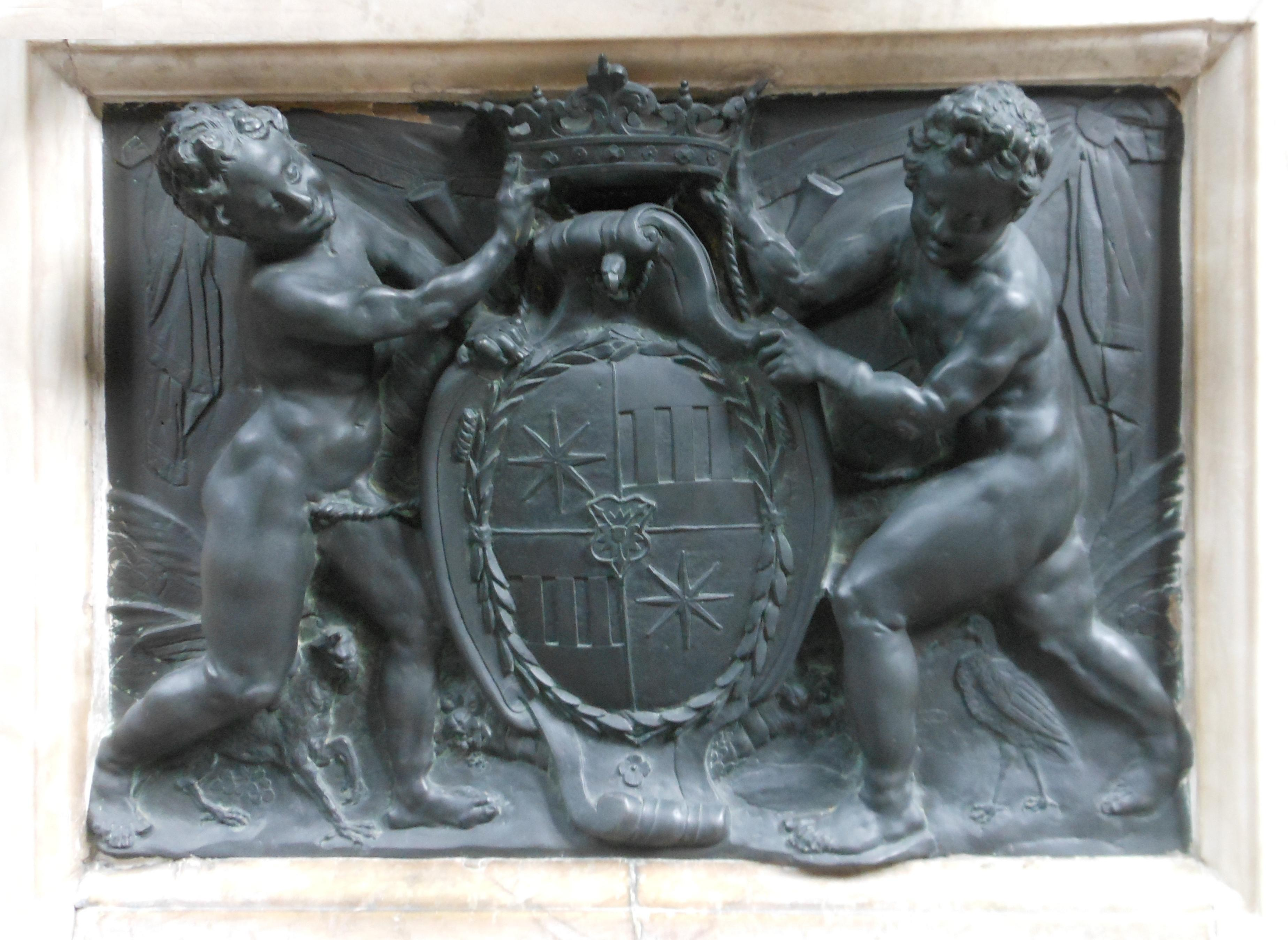 Stadthagen, Fürstenmausoleum, Adrian de Vries: Auferstehungsmonument, Wappen Fürst Ernst